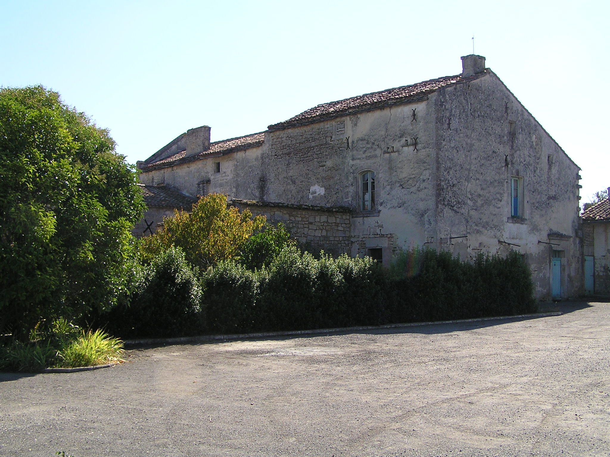 maisons à Champmillon